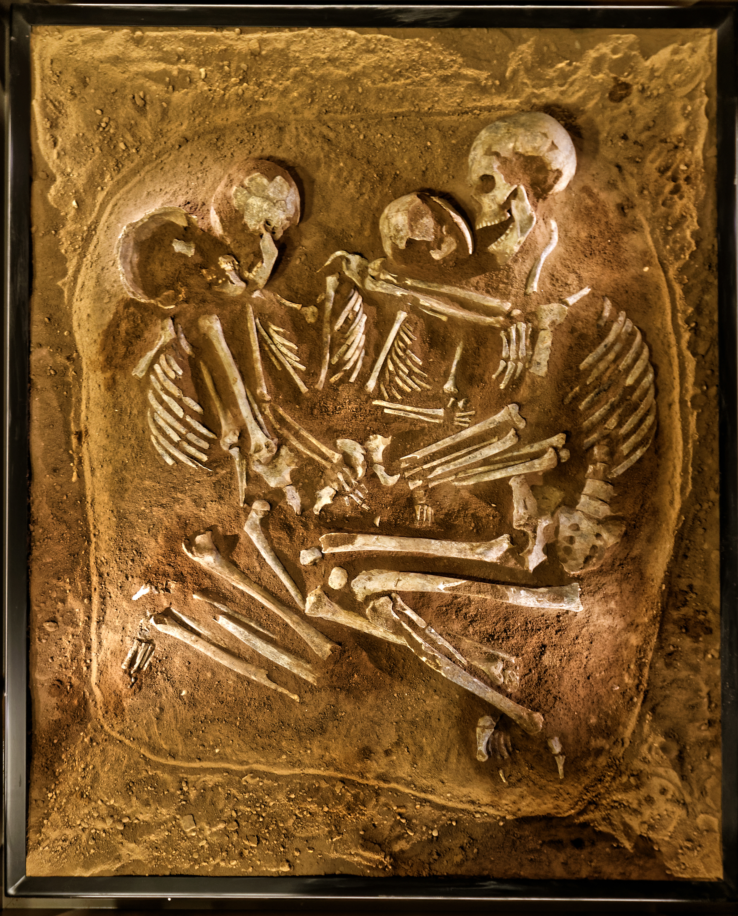 Museumsabteilung "Vor 4500 Jahren. Im Taubertal zuhause".